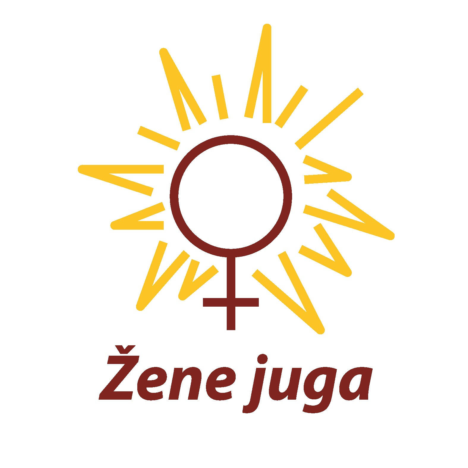 Logo organizacije Žene juga